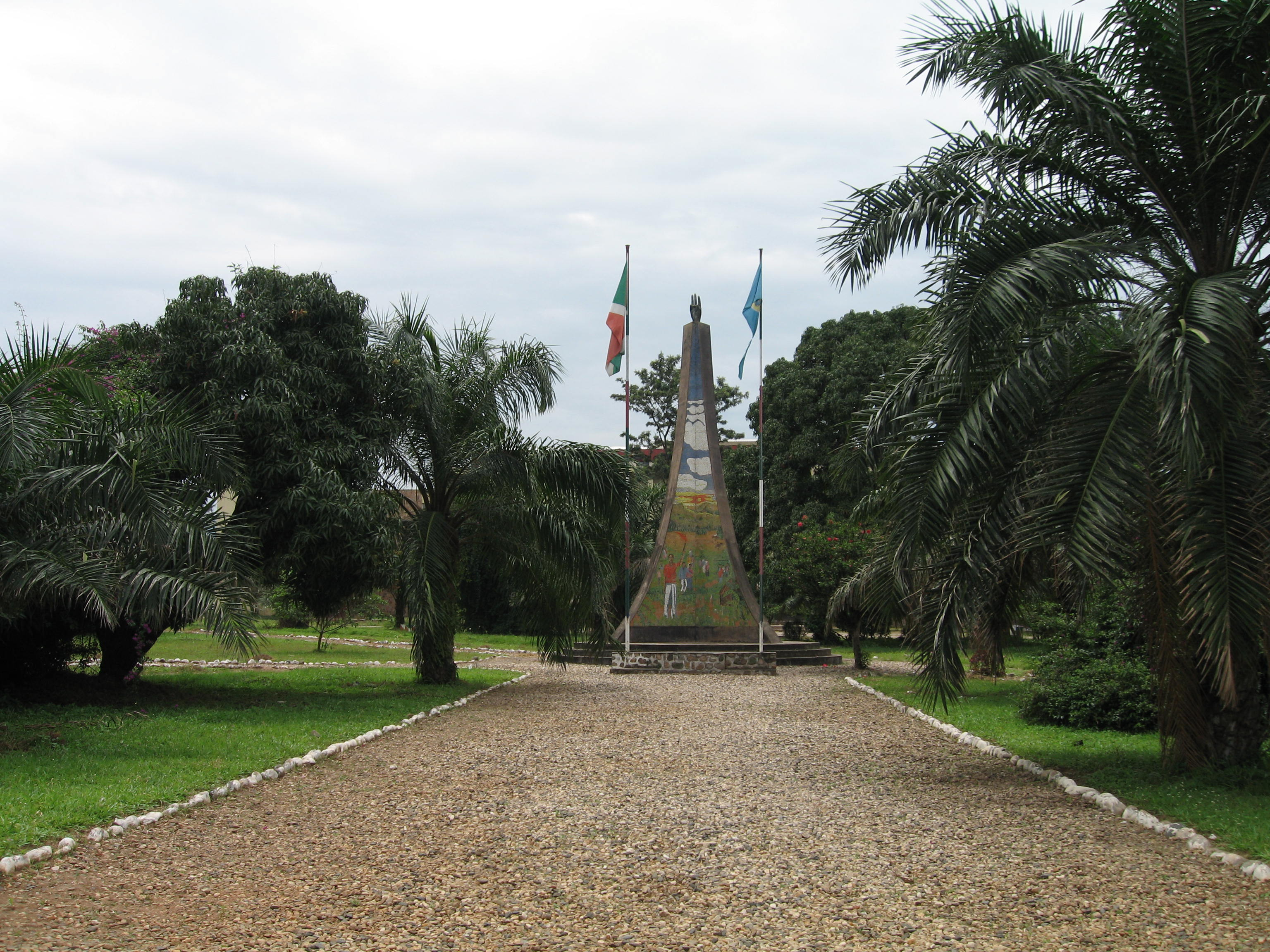 Plaza o Parque de la Revolución. Bujumbura, Burundi.